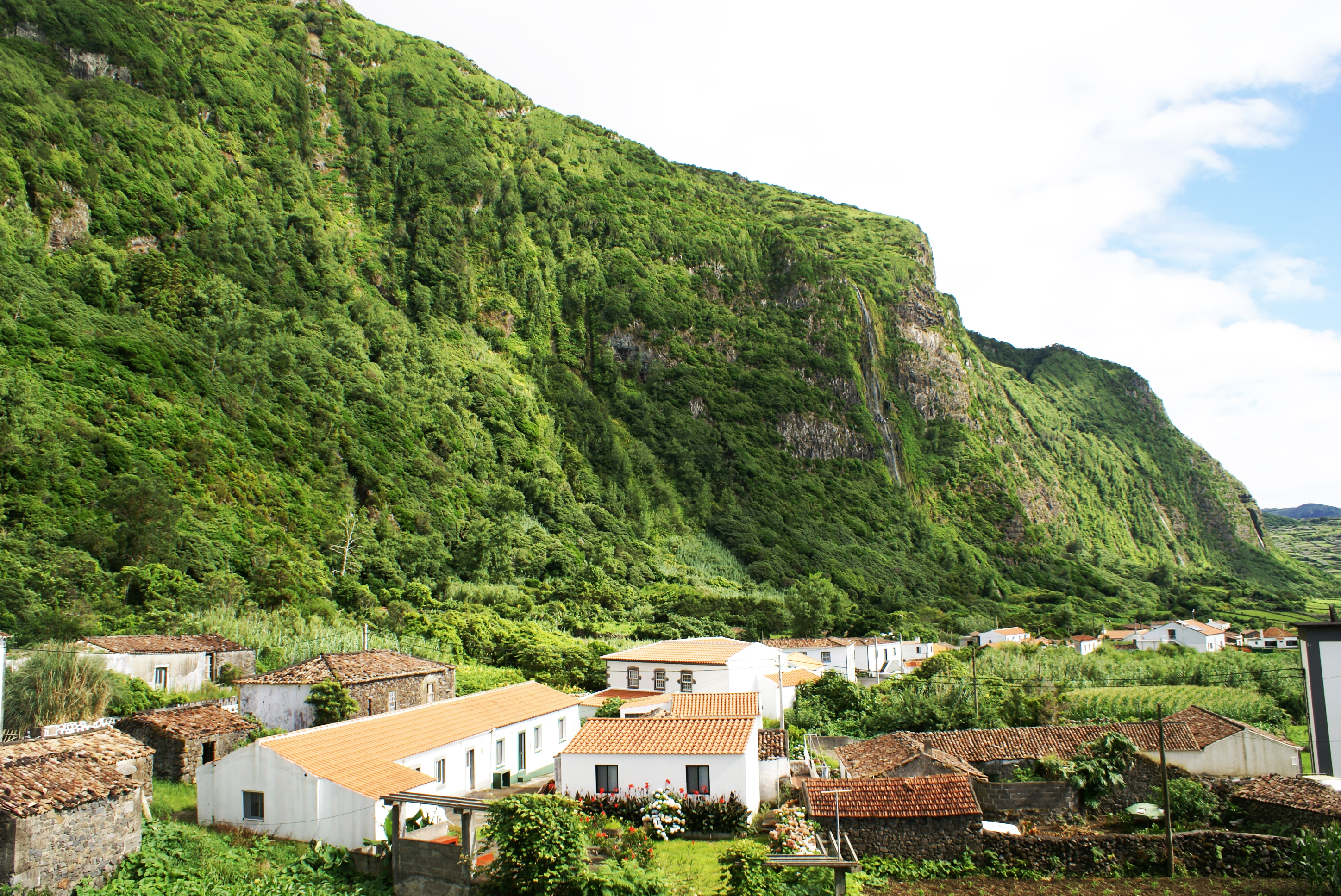 Vista parcial da Fajã Grande, ilha das Flores, Açores, Arquivo de Villa Maria, ilha Terceira, Açores